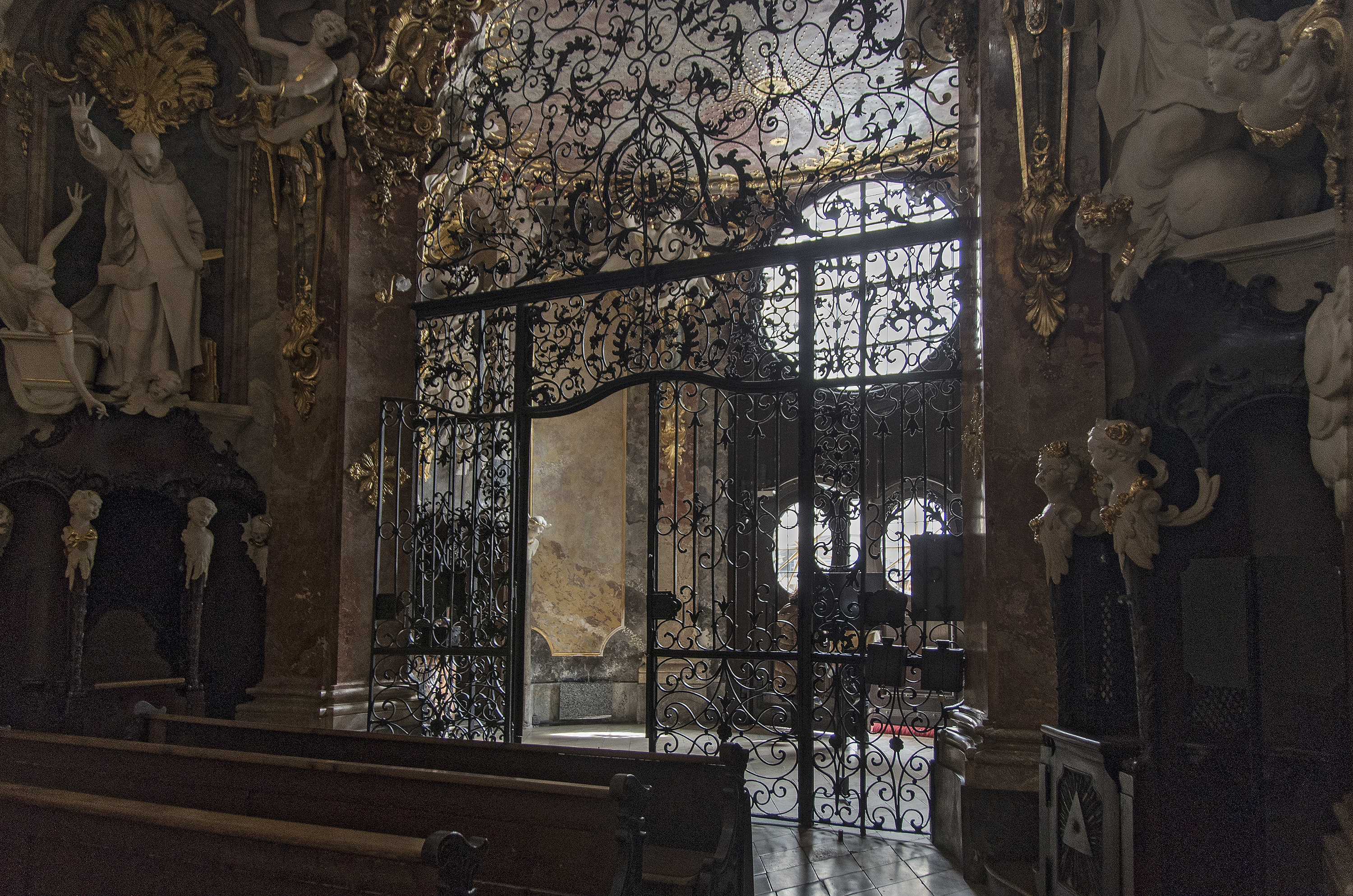 St. Johann Nepomuk-Kirche (Asamkirche). München 80333-Sendlingerstr. 34.N 48.13510 E 011.569444.This is a photograph of an architectural monument.